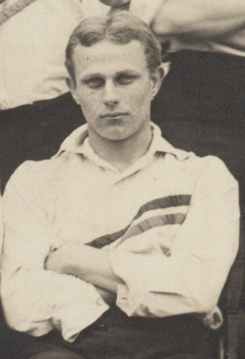 Karel Gleenewinkel Kamperdijk (1883—1975) — was een Nederlands voetballer.